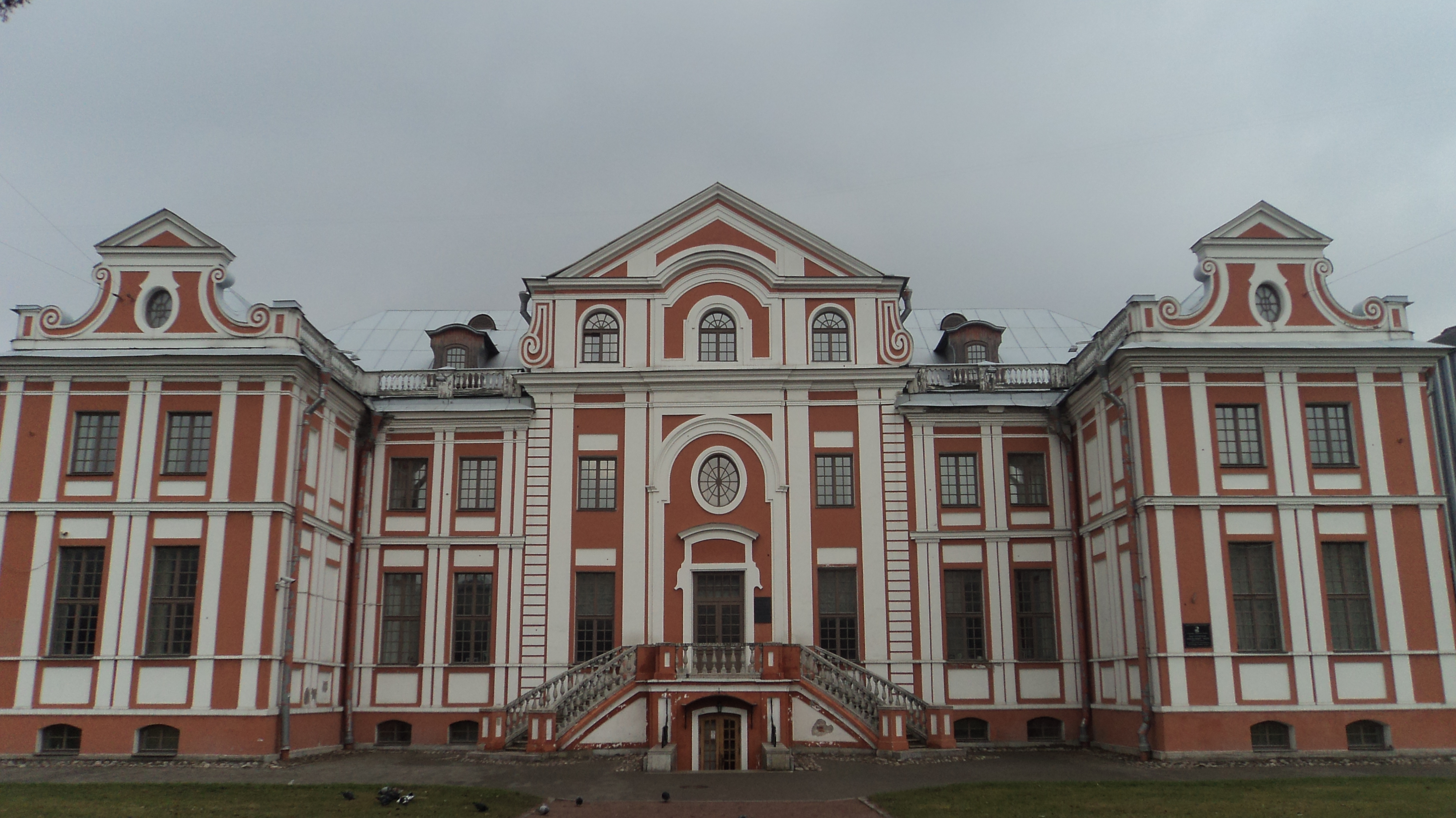 Կիկինի պալատ, Սանկտ Պետերբուրգ